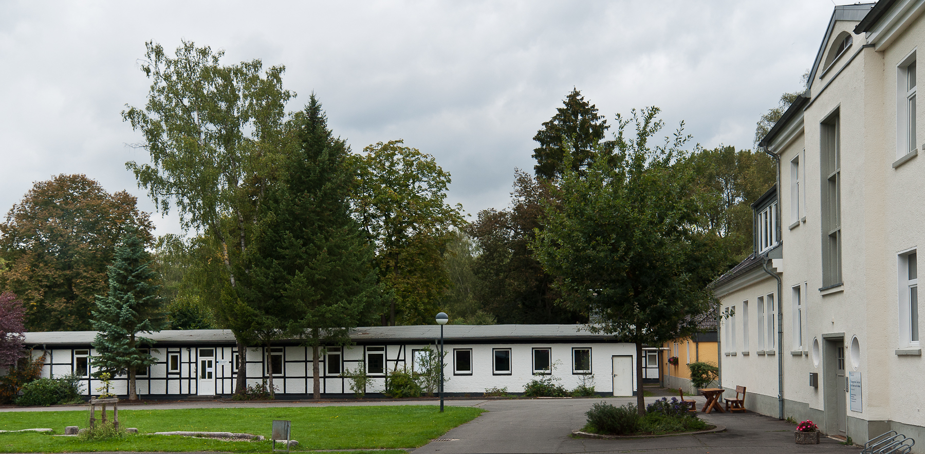 Rösrath, Denkmalnummer 69, Pestalozziweg, ehem. Kriegsgefangenenlager „Hoffnungsthal“, heute Kinderdorf Stephansheide This is a photograph of an architectural monument.